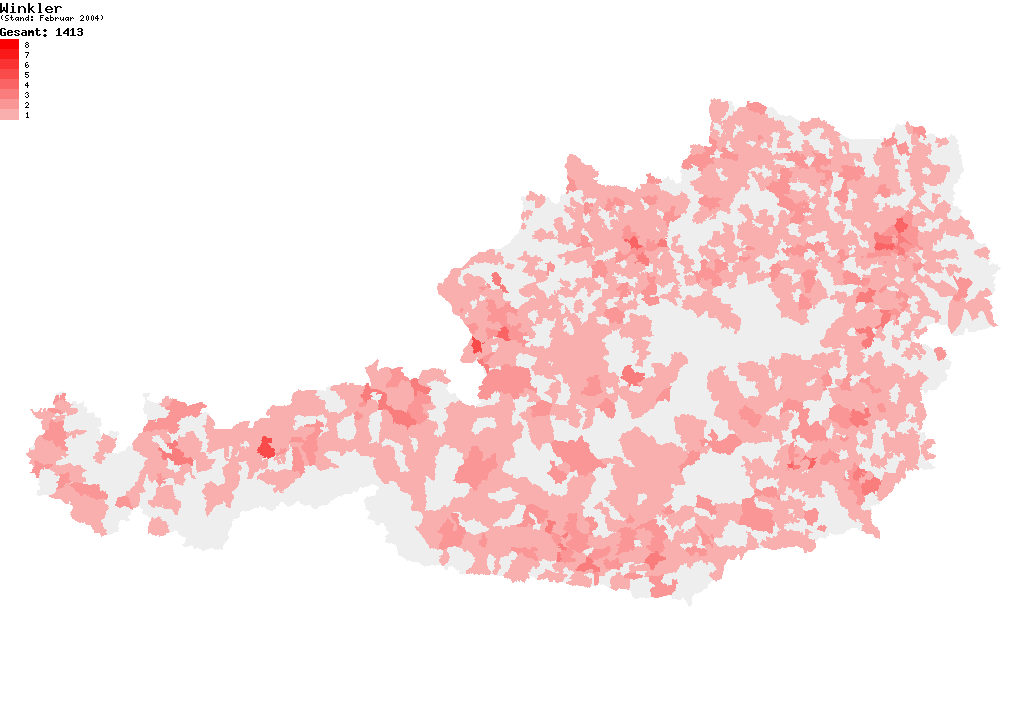 Verteilung des Nachnamens Winkler in Österreich nach dem Telefonbuch mit Stand vom Februar 2004